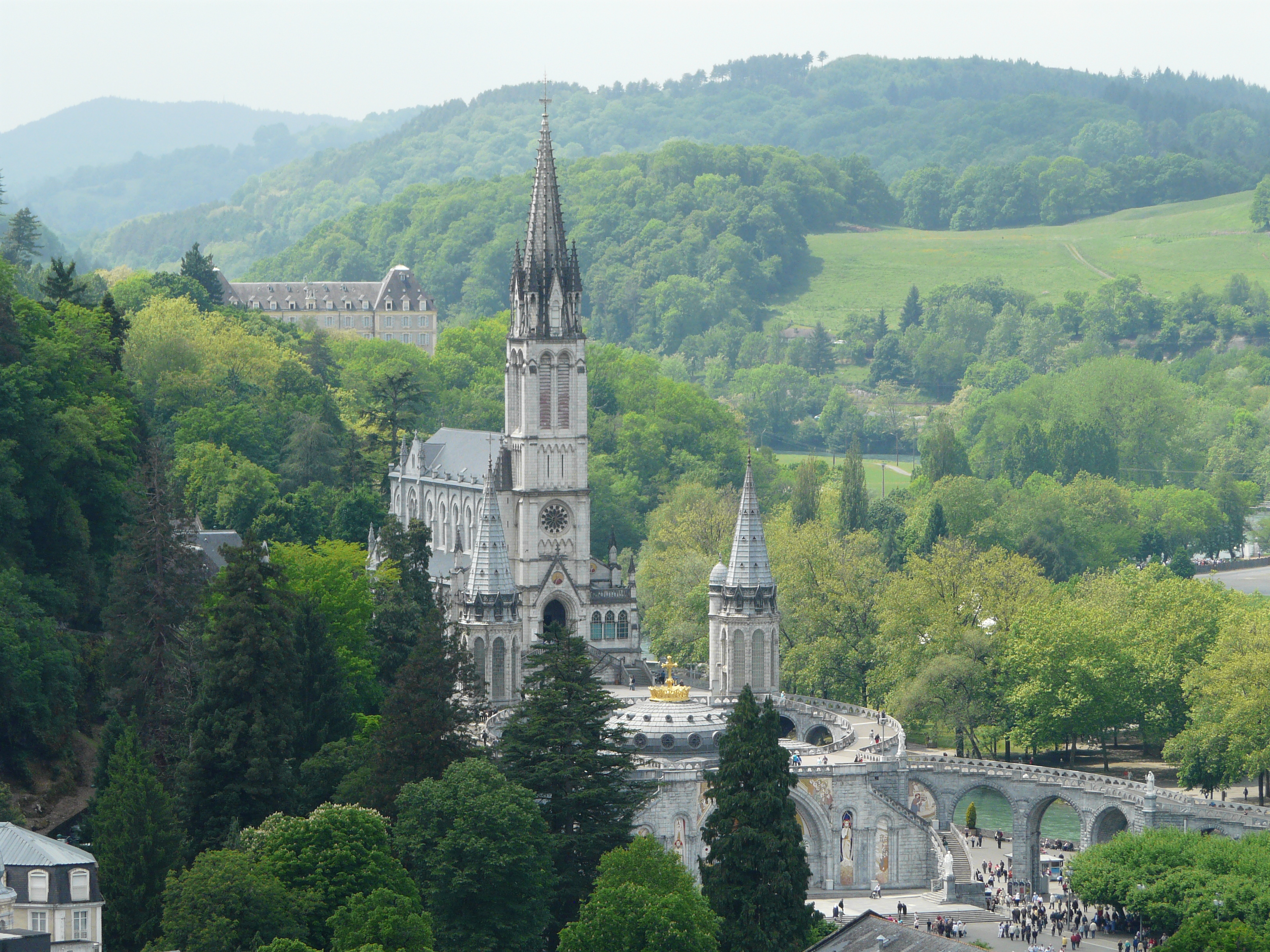 La basilique de l'Immaculée-Conception et, au premier plan, la basilique Notre-Dame du Rosaire, Lourdes, Hautes-Pyrénées, France.